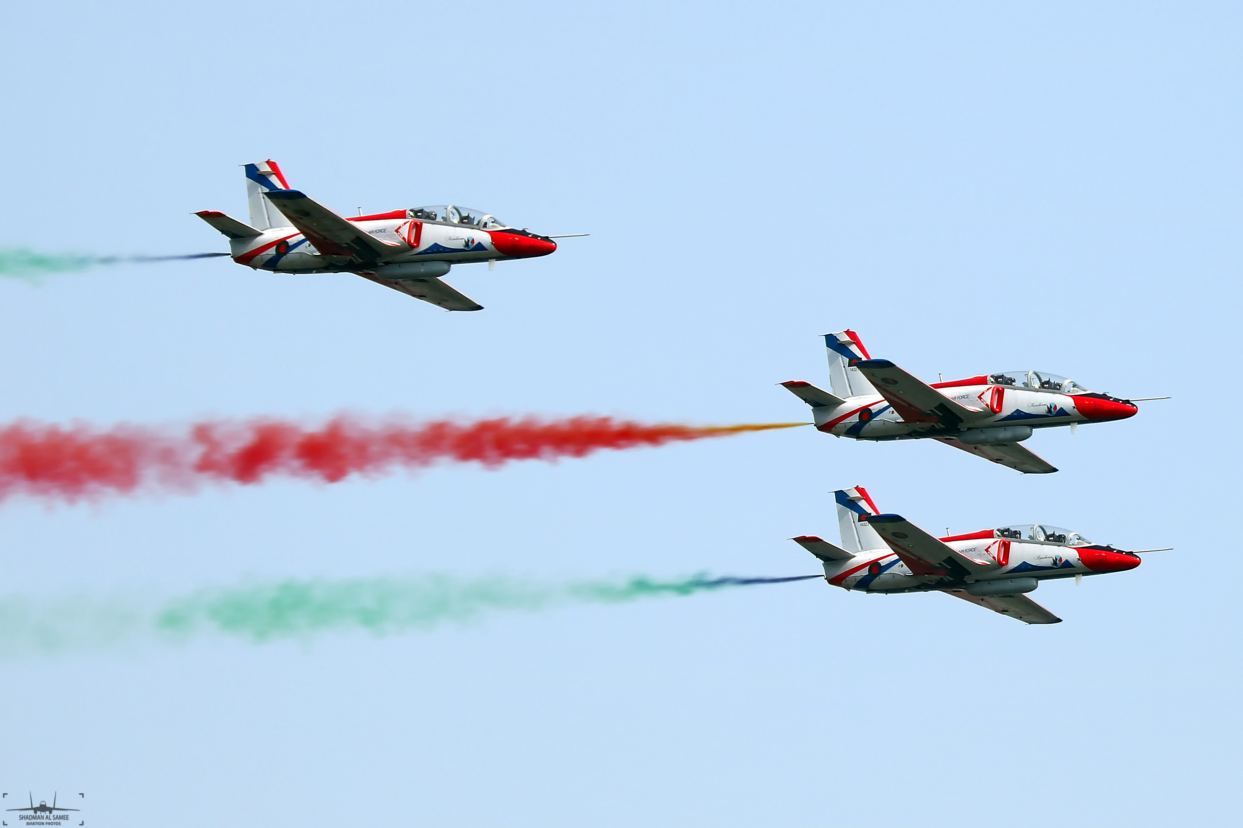 VGTJ/ VDFP 2017.